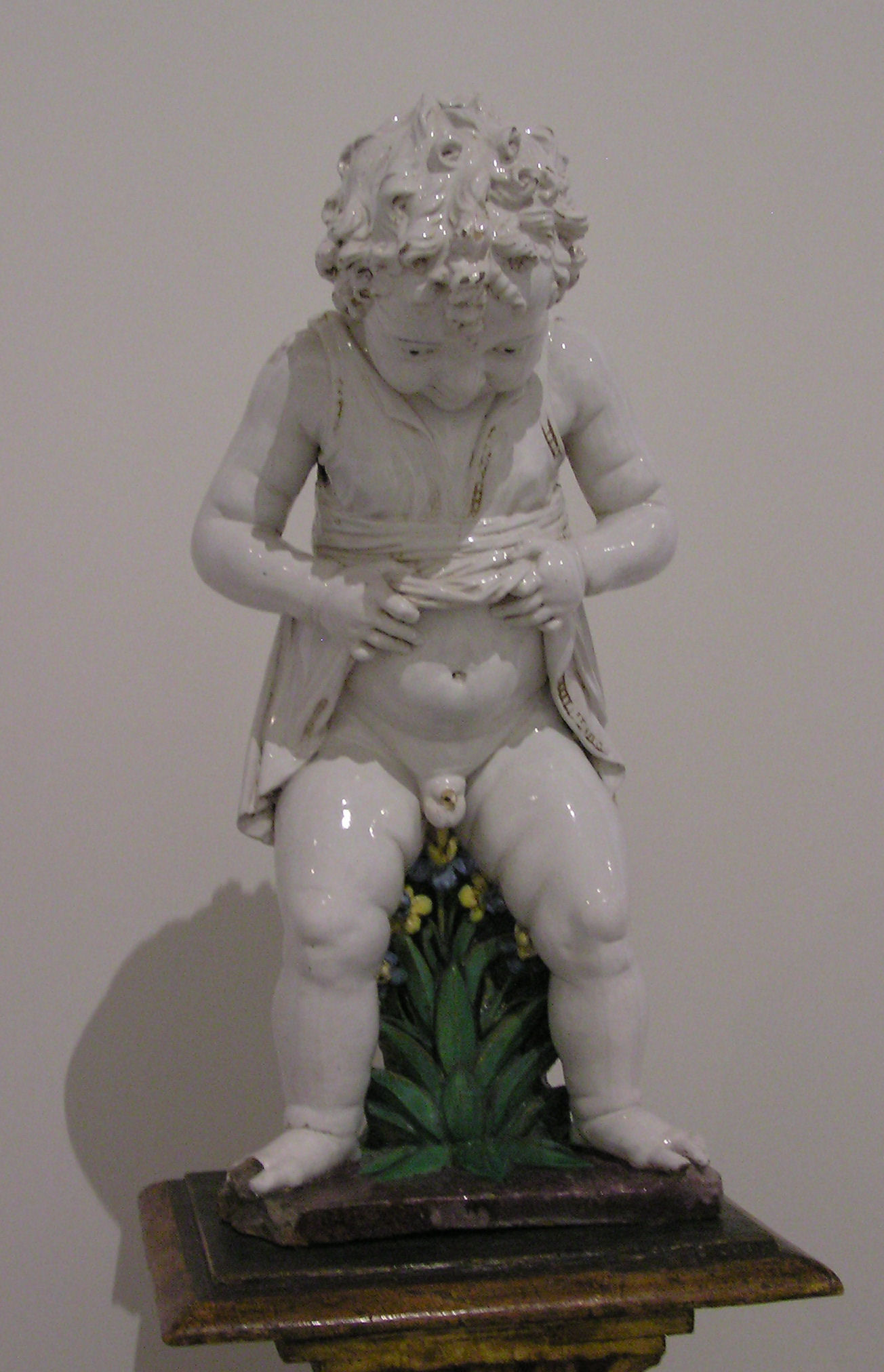 Girolamo della Robbia: Boy as Fountain Figure (1515-20), Bode Museum, Berlin